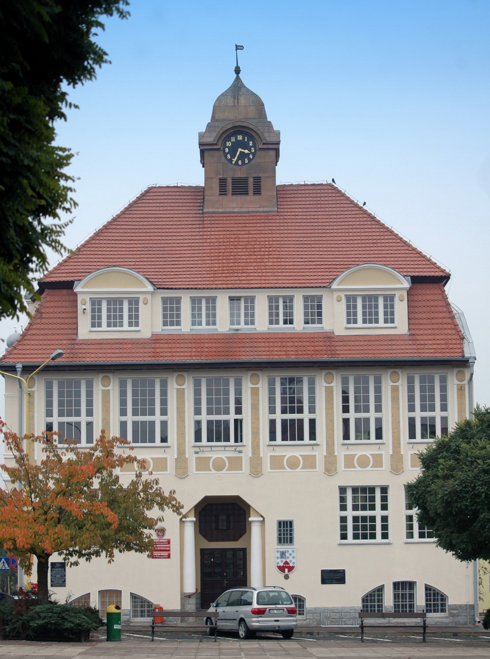 Ratusz w Nowogardzie.